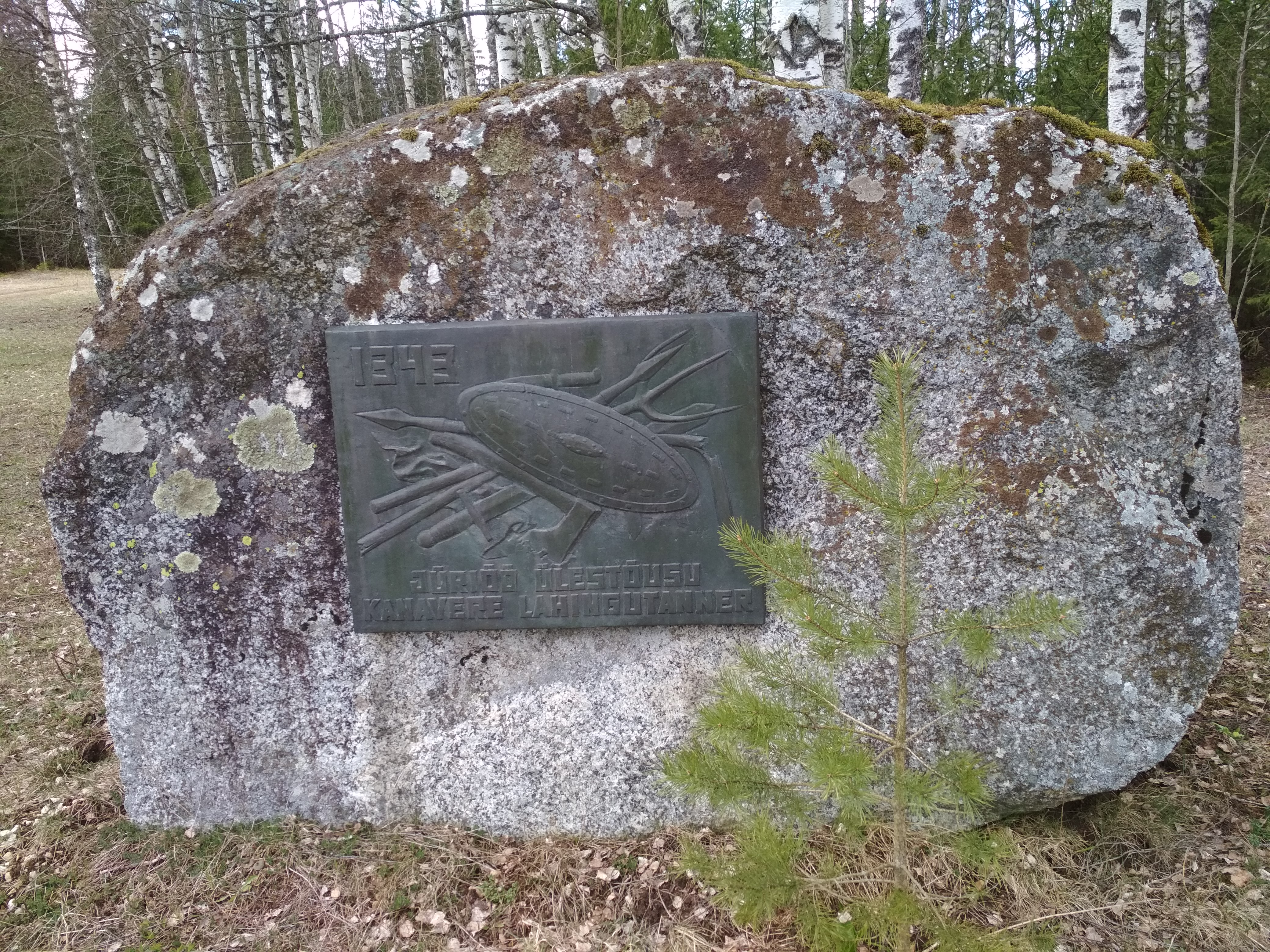 Jüriöö ülestõusu Kanavere lahingu mälestuskivi (Kanavere külas)